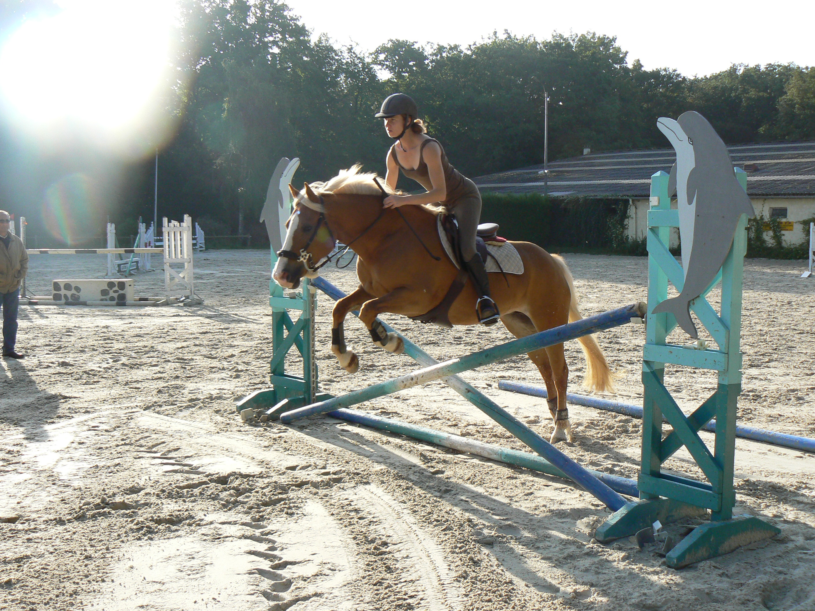 haflinger